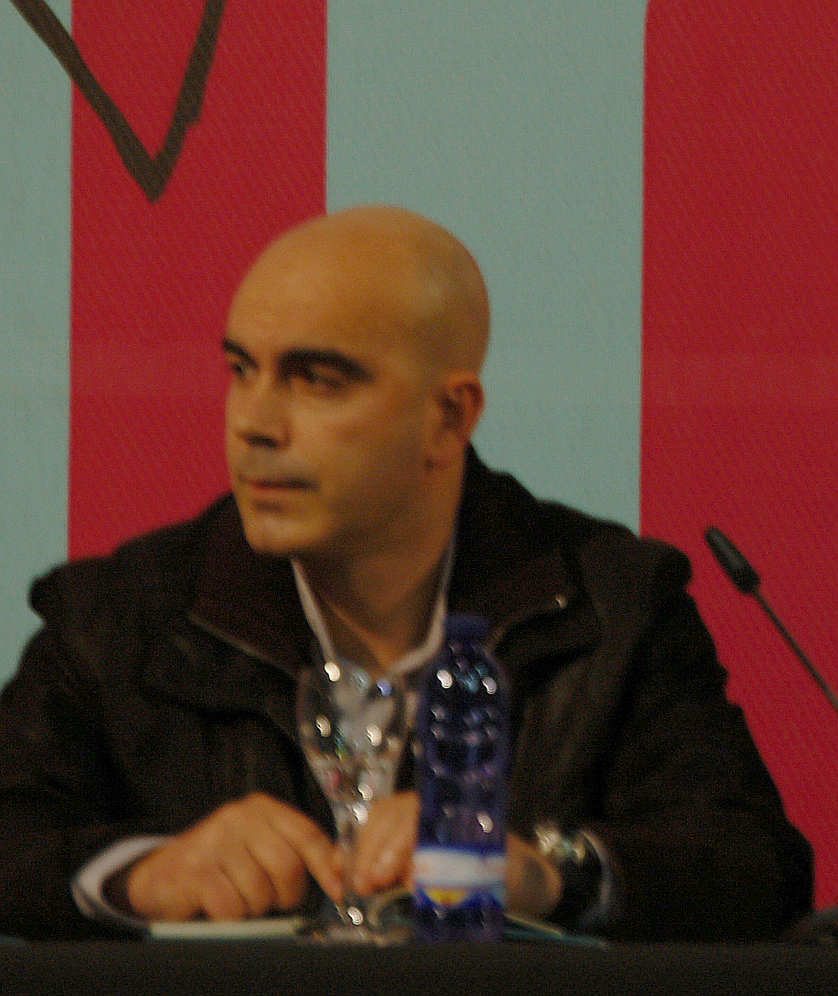 Pinto e Chinto no Culturgal 2010